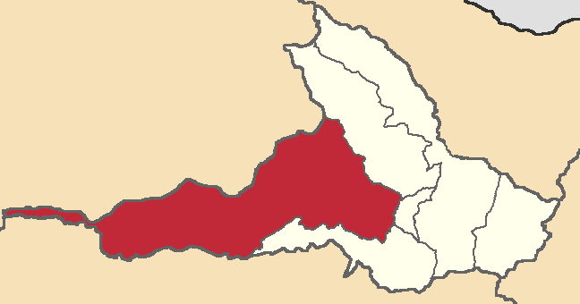 Mapa localizacor del cantón Cotacachi, Imbabura, Ecuador